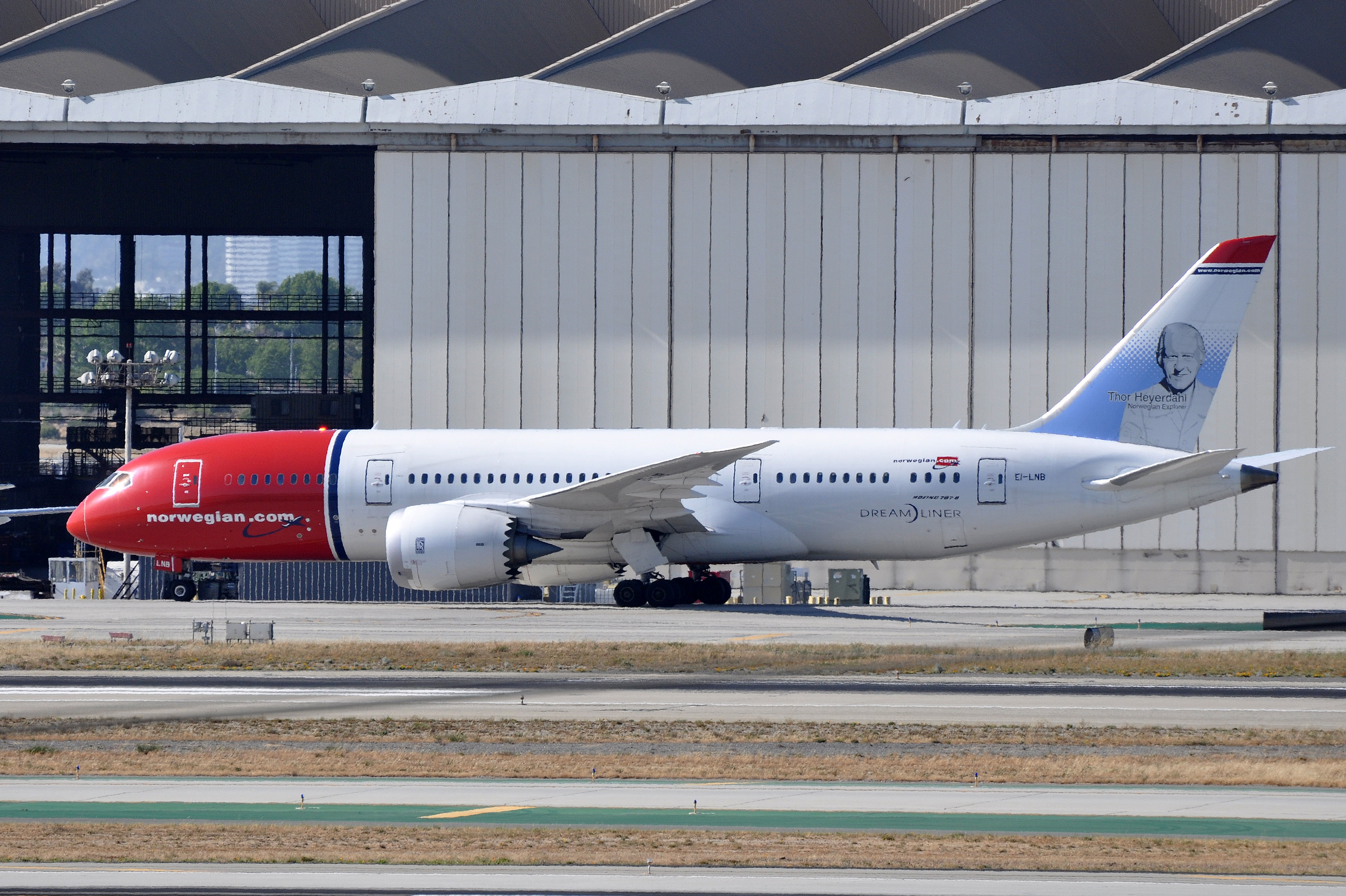 MSN 35305 LN 112 B787-8 / 787-8 NORWEGIAN LONG-HAUL LAX AIRPORT NOW NORWEGIAN LONG HAUL AS LN-LNB